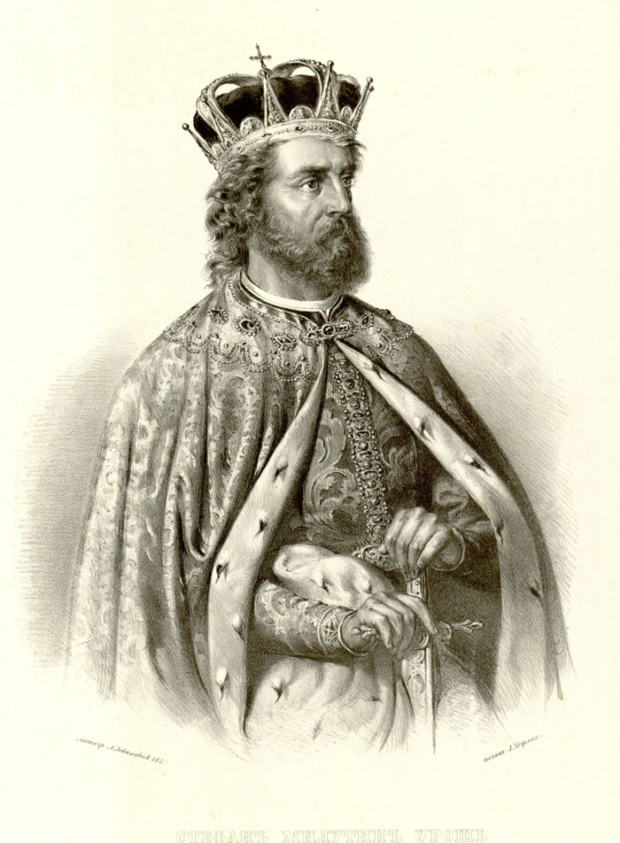 Stefan Milutin Uros